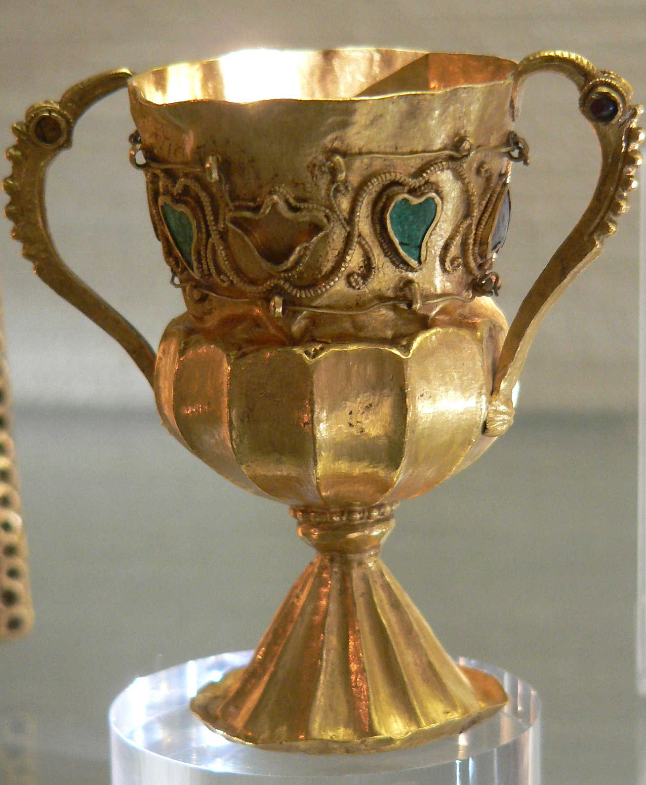 Trésor de Gourdon, calice Trésor découvert près de Gourdon (Saône-et-Loire), en 1845. Or, turquoise et grenats, fin du Ve-début du VIe siècle.